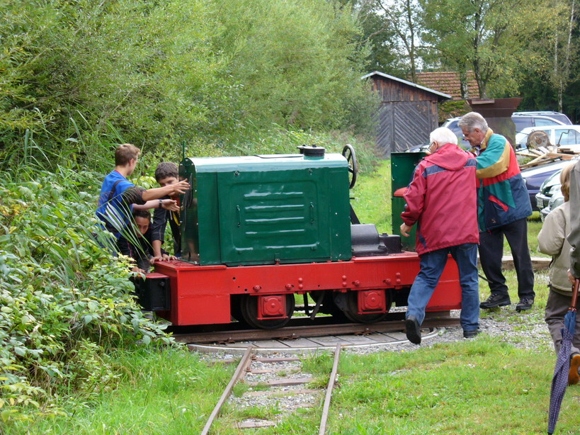 Oberschwäbischen Torfmuseum: Wurzacher Ried Torfbahn Zeiler Torfwerk